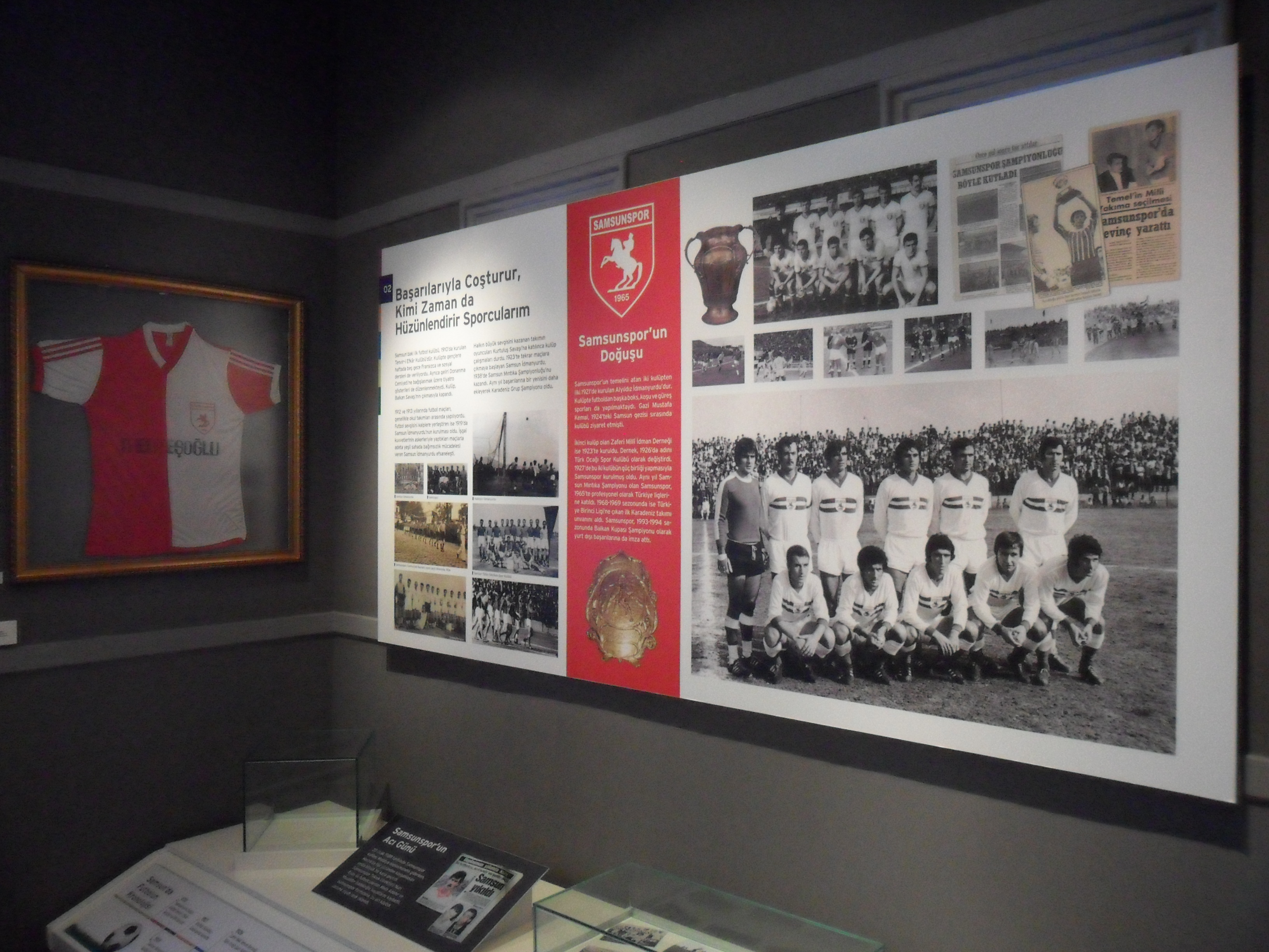 Samsun Kent Müzesi'nde sergilenen Samsunspor bilgilendirme panosu ve Muzaffer Badalıoğlu'nun forması.